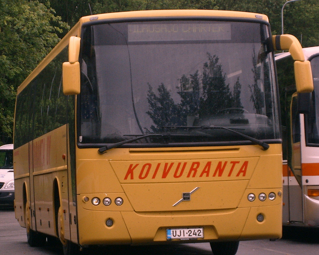 Koivurannan Volvo 8700 linja-auto